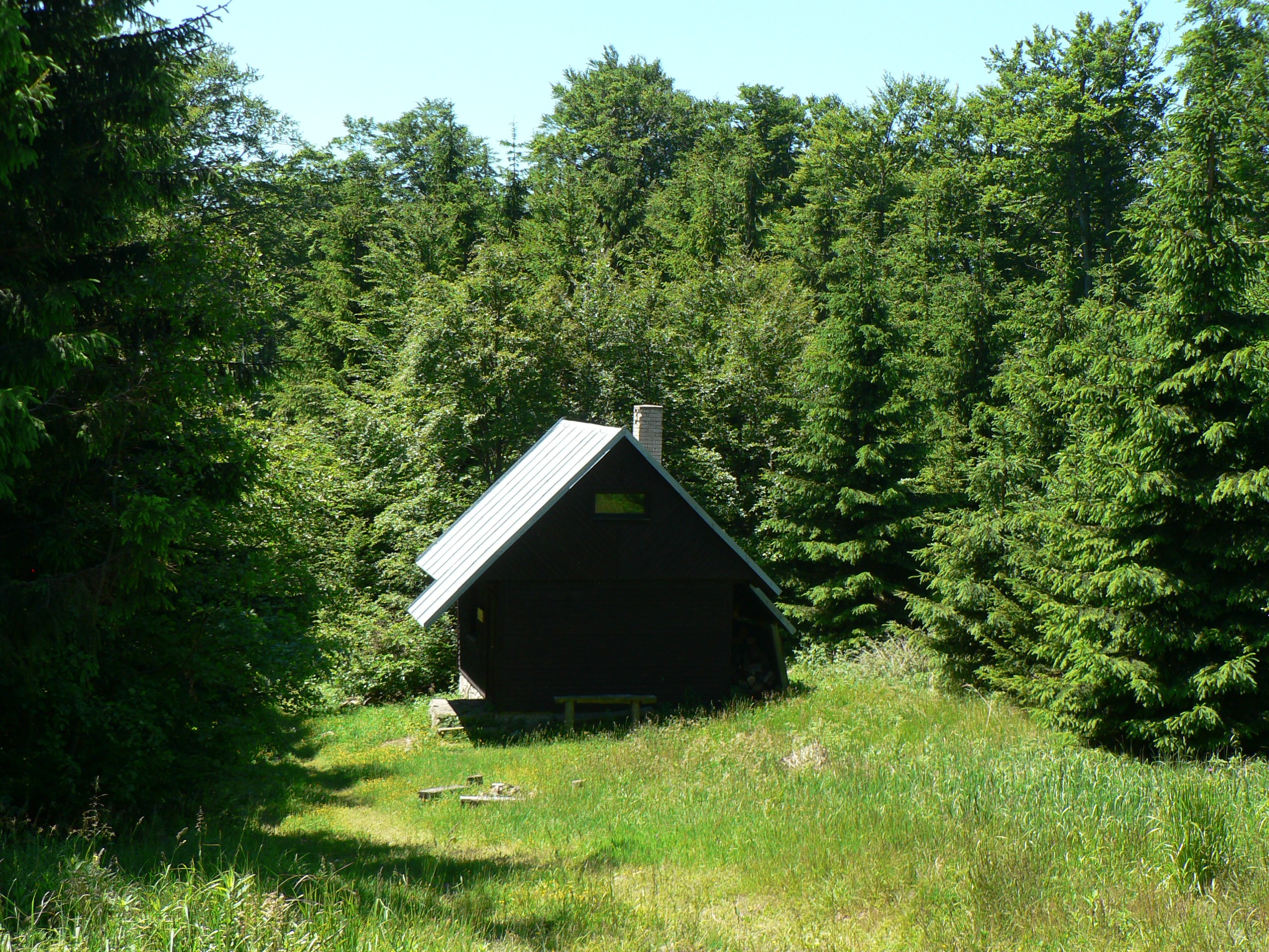 Lovecká chata Margaretka na svazích Mravenečníku, Hrubý Jeseník.